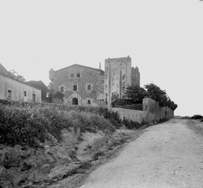 Casa pairal de Santa Margarida. Josep Salvany i Blanch (1917)